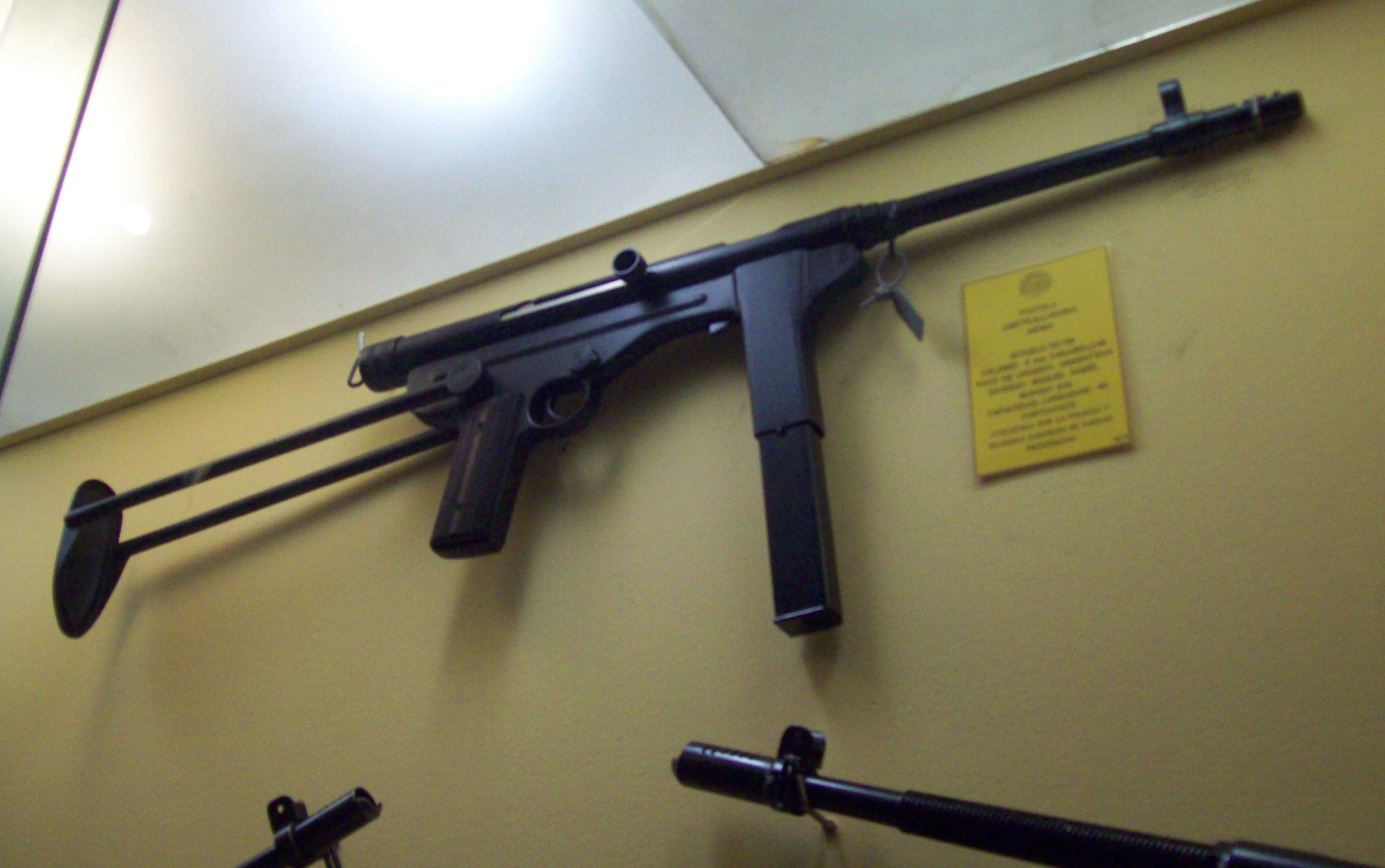 Pistola ametralladora MEMS expuesto en el Museo de Armas de la Nación, ciudad de Buenos Aires, Argentina 2014.